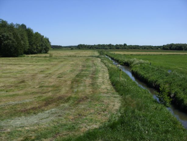 Naturschutzgebiet „Im Hausbeeken“ mit Dohrener Bach